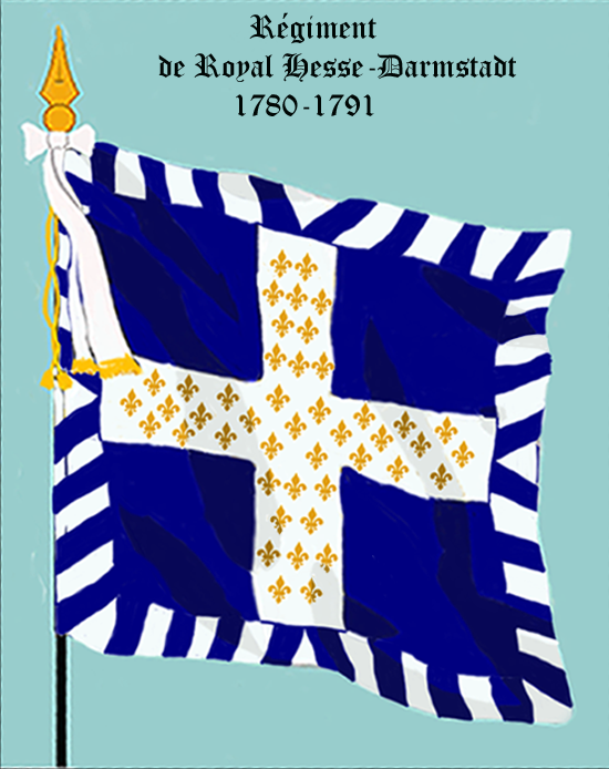 Ordonnanzfahne eines Fremdenregiments im königlich französischen Dienst. - Entnommen und überarbeitet aus: „LES UNIFORMES ET LES DRAPEAUX DE L'ARMÉE DU ROI“ Marseille 1899. (Drapeau d'Ordonnance d' un régiment etranger au service française.)